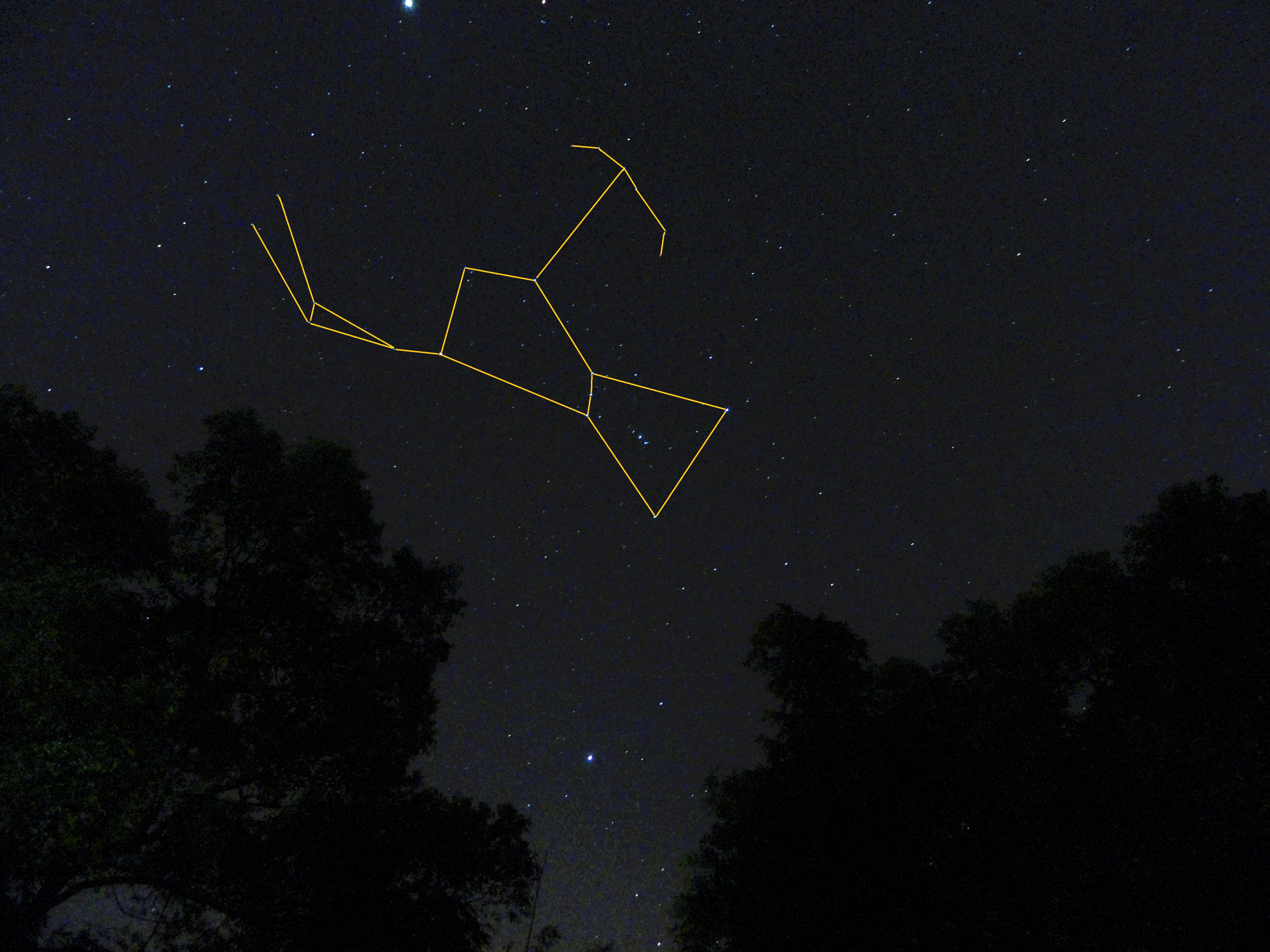 中文（中国大陆）: 2012年10月21日在台湾新北市拍摄的猎户座（已连线）